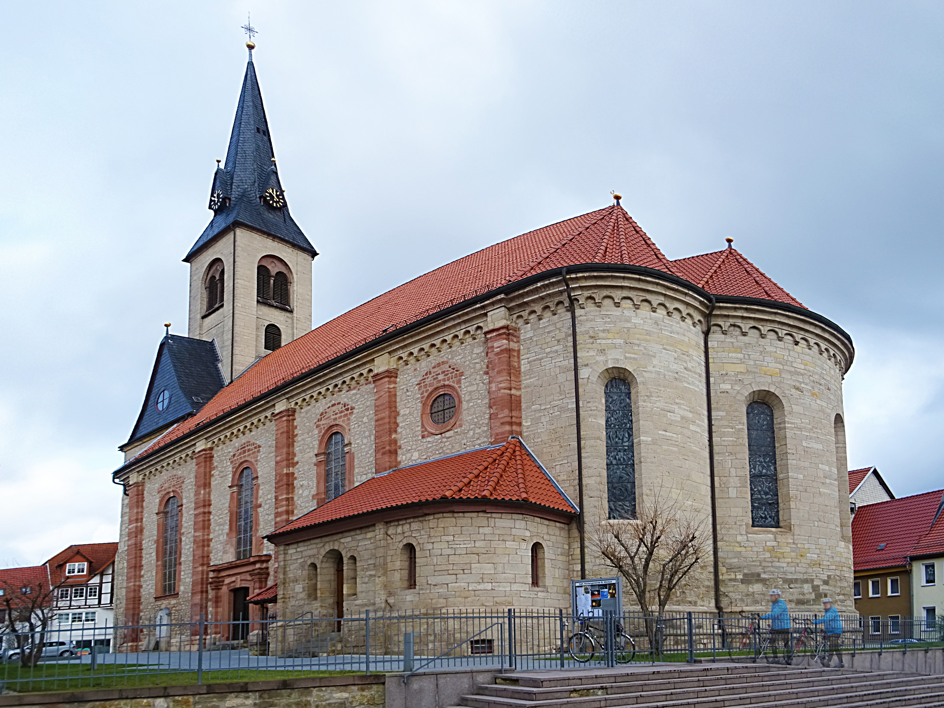 St.-Nikolaus-Kirche Worbis von Süden